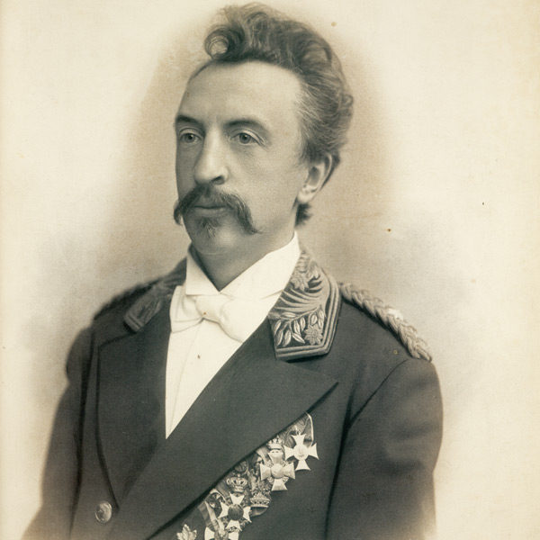 Erasmus Kittler, Inhaber des ersten Lehrstuhls für Elektrotechnik an der Technischen Hochschule Darmstadt